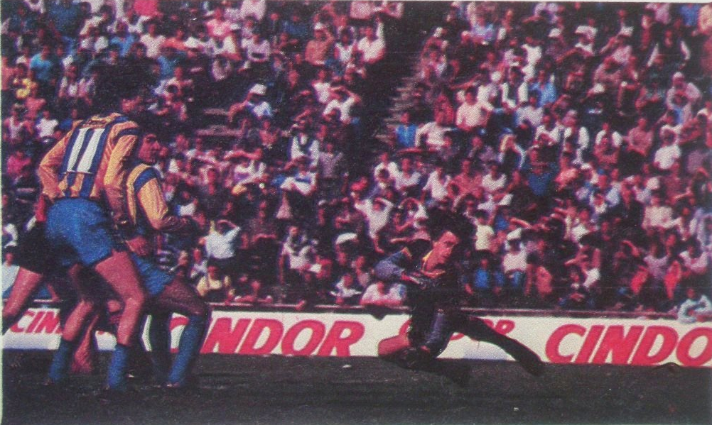 Partido del 20 de septiembre de 1987, Rosario Central 1-Newell's 0. En la imagen se ve al arquero Scoponi (Newell's) siendo vencido por el remate de Claudio Scalise (fuera de foco), que le dará la victoria a Rosario Central.